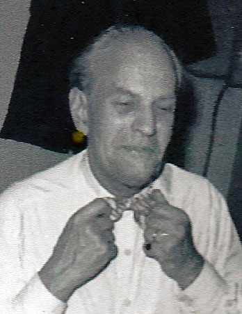 Al. Samfors, skådespelare